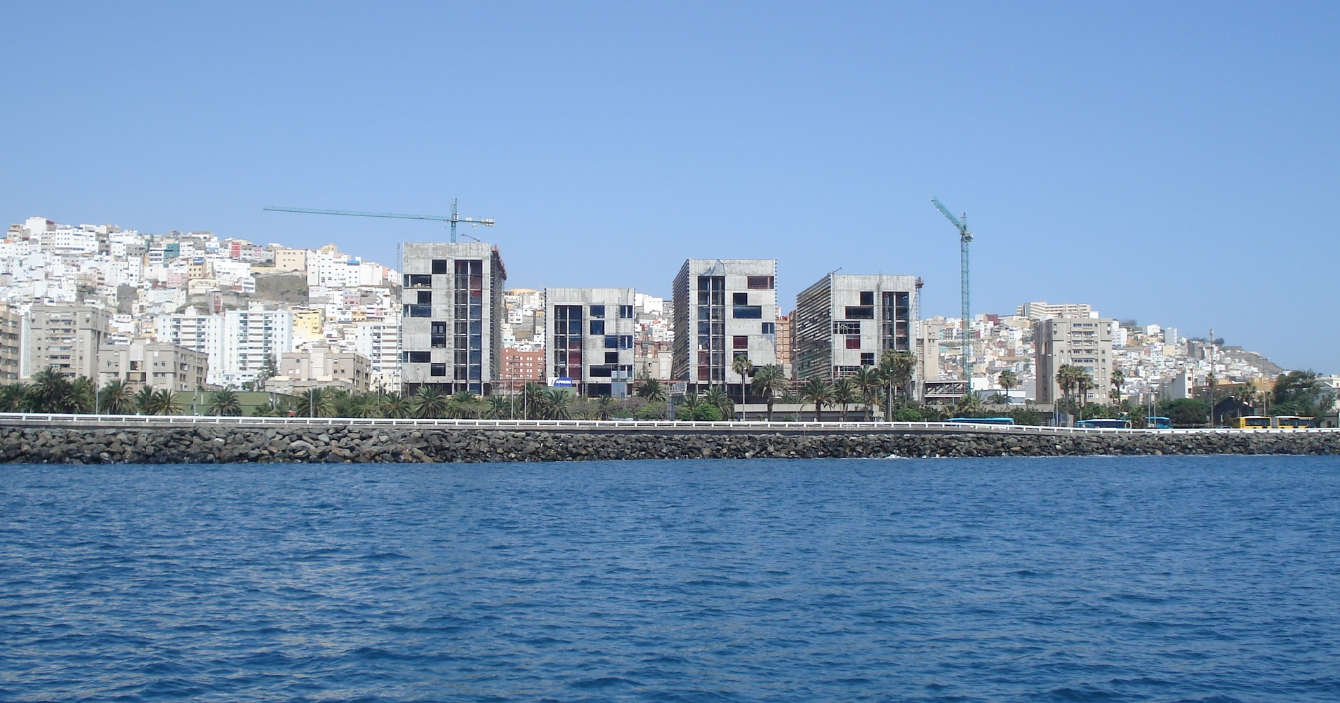 En construcción vista desde el mar. José Antonio Sosa, Magüi Gonzalez, Miguel Santiago, architects: Law Courts Complex in Las Palmas de Gran Canaria (2004-2010) [1]